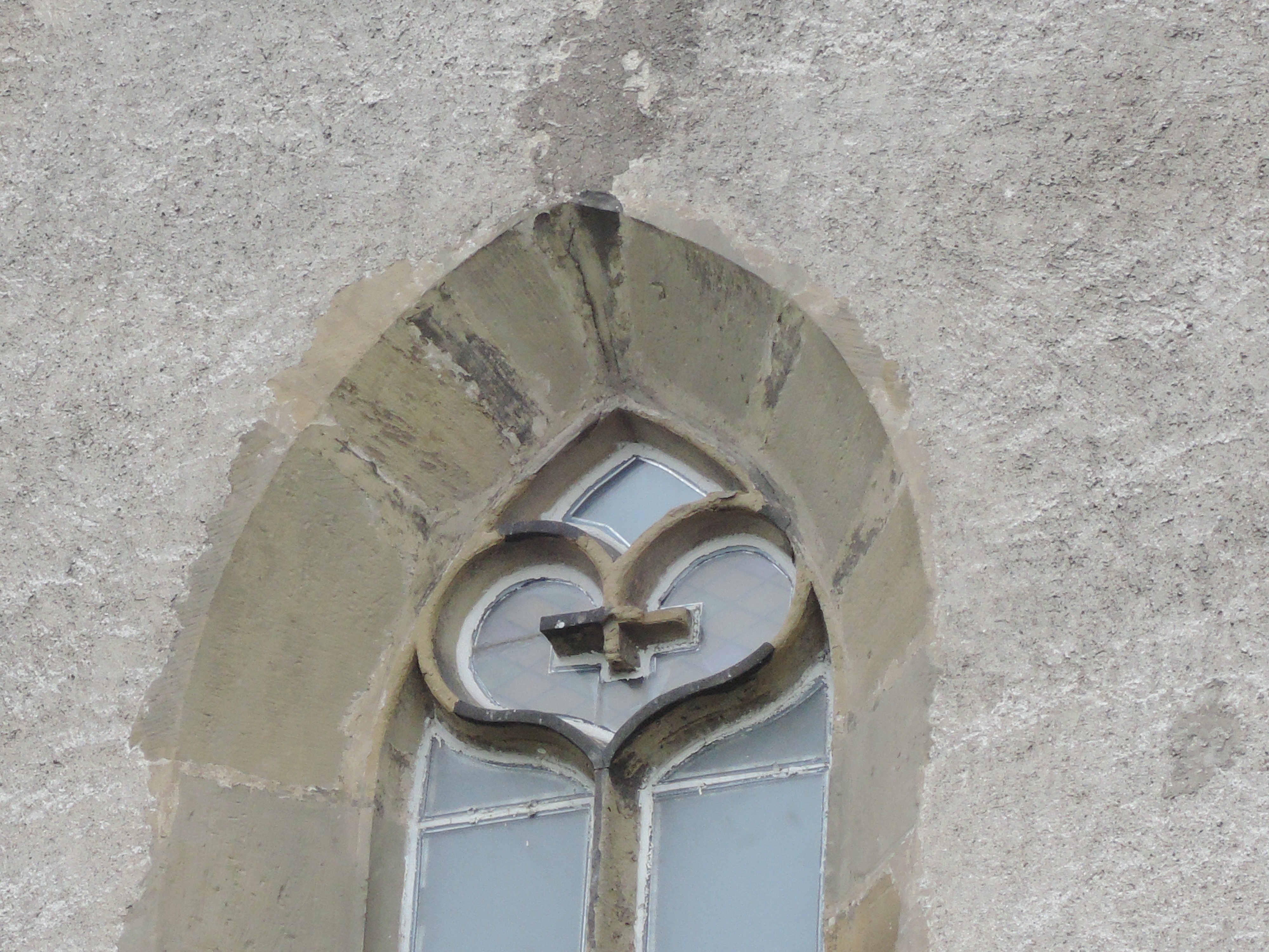 františkánsky motív